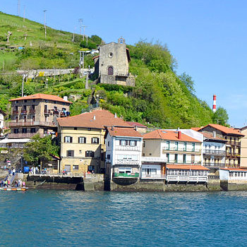 Santa Ana baseliza, Pasai Donibane, Euskal Herria